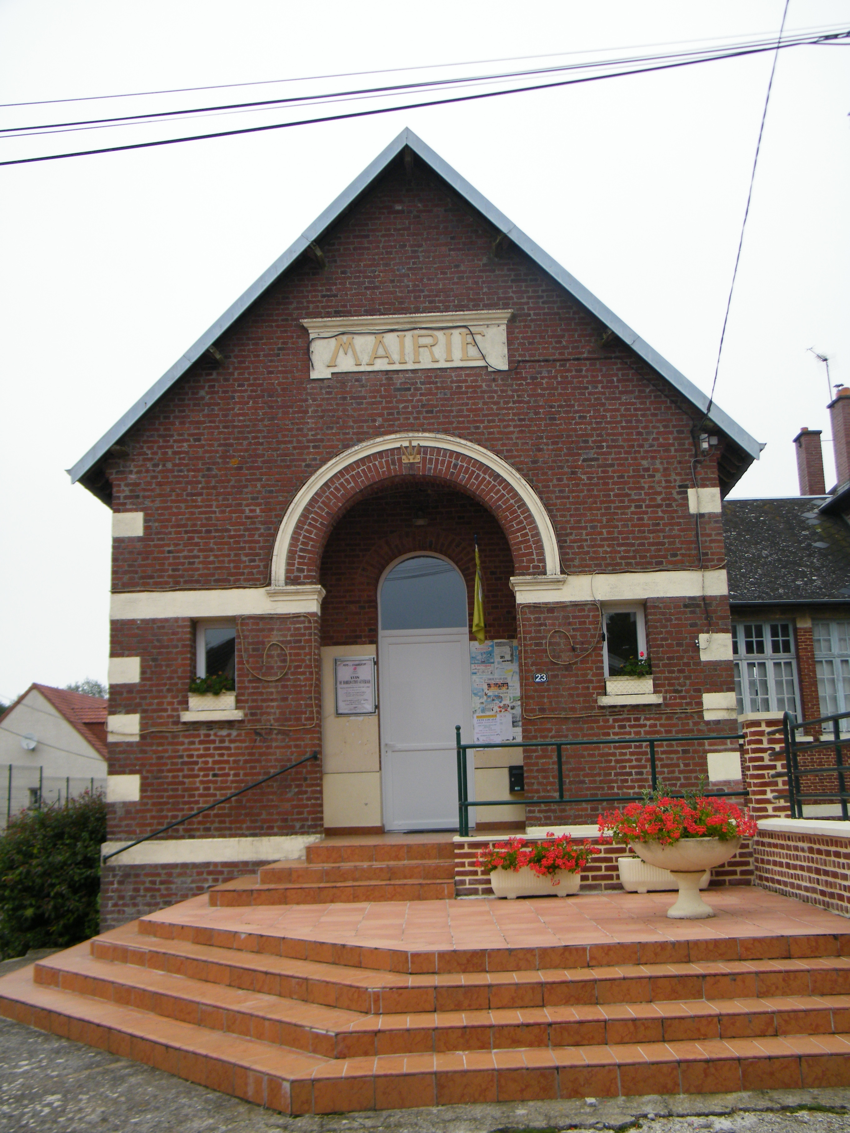 Mairie.